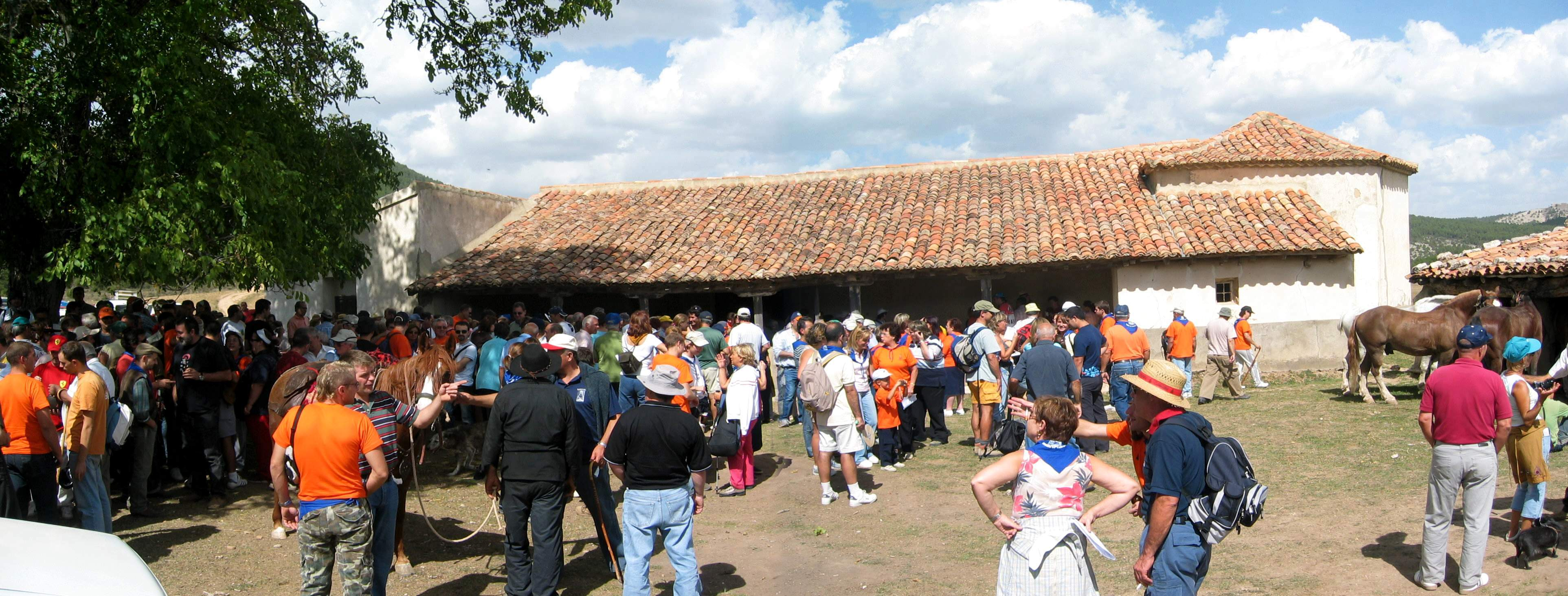 Vista meridional de la ermita de Santerón, Algarra (Cuenca), desde la placeta, en el XLI septenario, año 2005